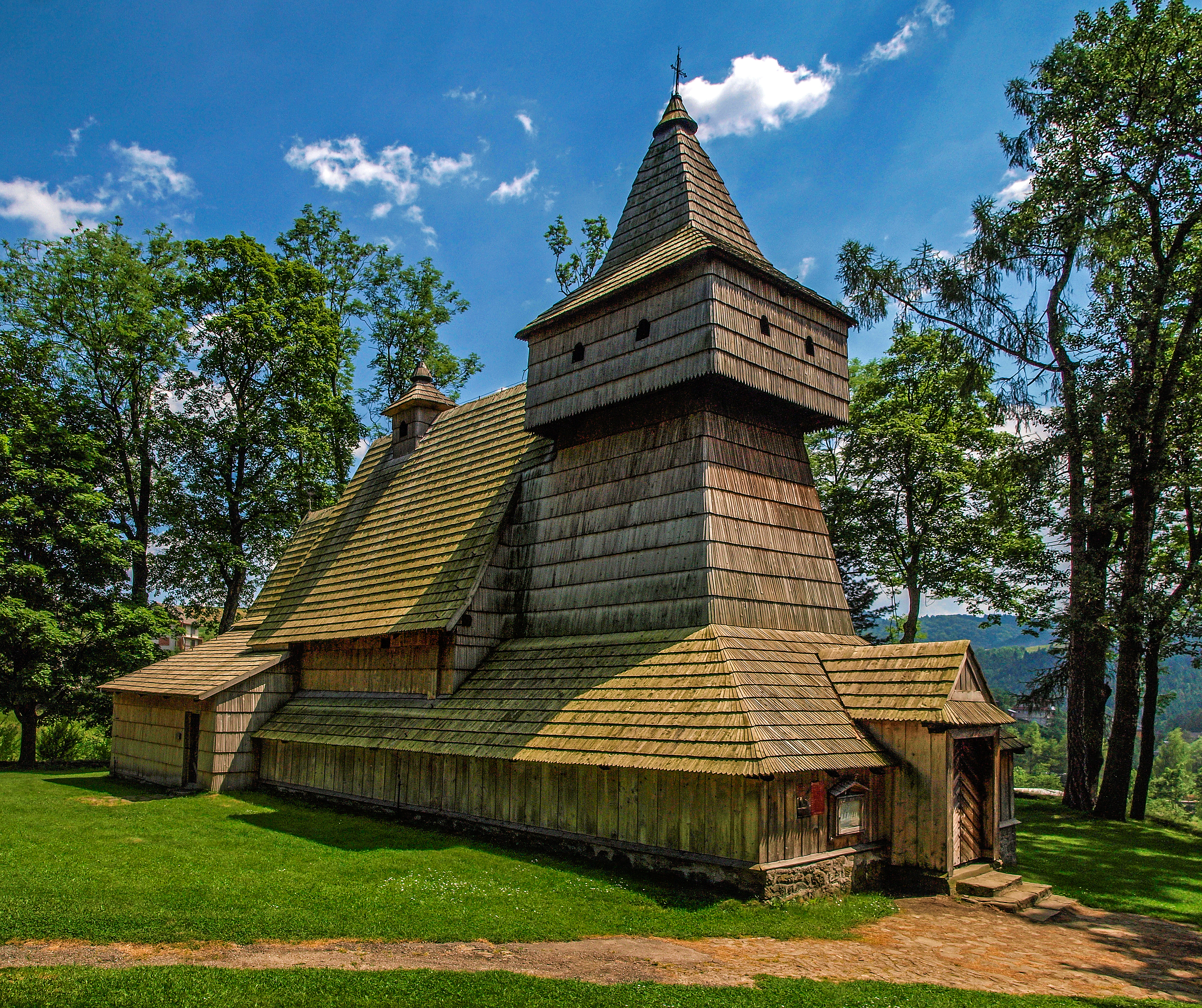 Grywałd, kościół par. p.w. św. Marcina, XV/XVI